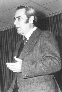 Don Ricardo Olivós Arroyo (1910-2003), estudioso de la teoría del fútbol, conferenciando sobre su teoría.